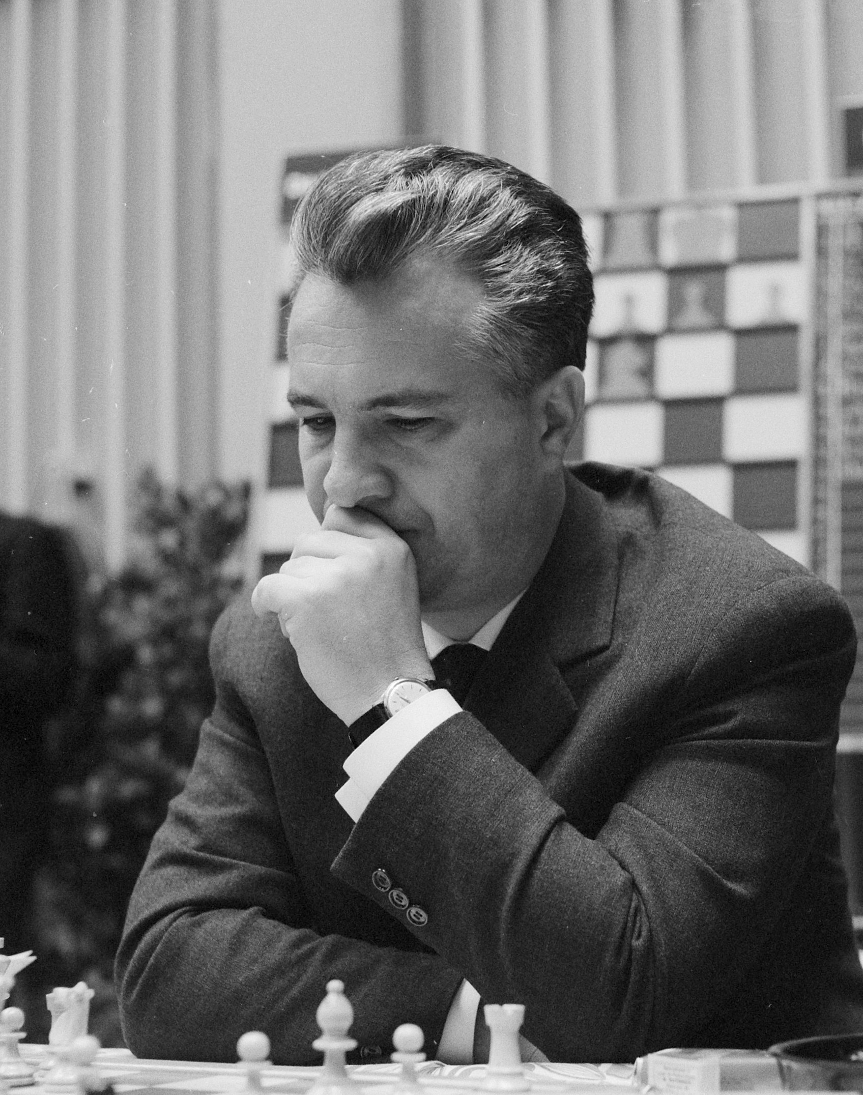 28e Hoogoven schaaktoernooi te Beverwijk, Damjanovic (Joegoslavie)